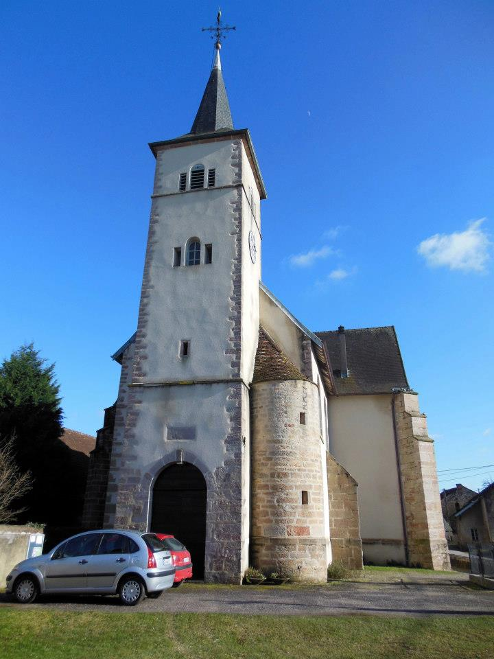 Eglise Saint-Sébastien, Rue du Lavoir, à Peintre (Jura).